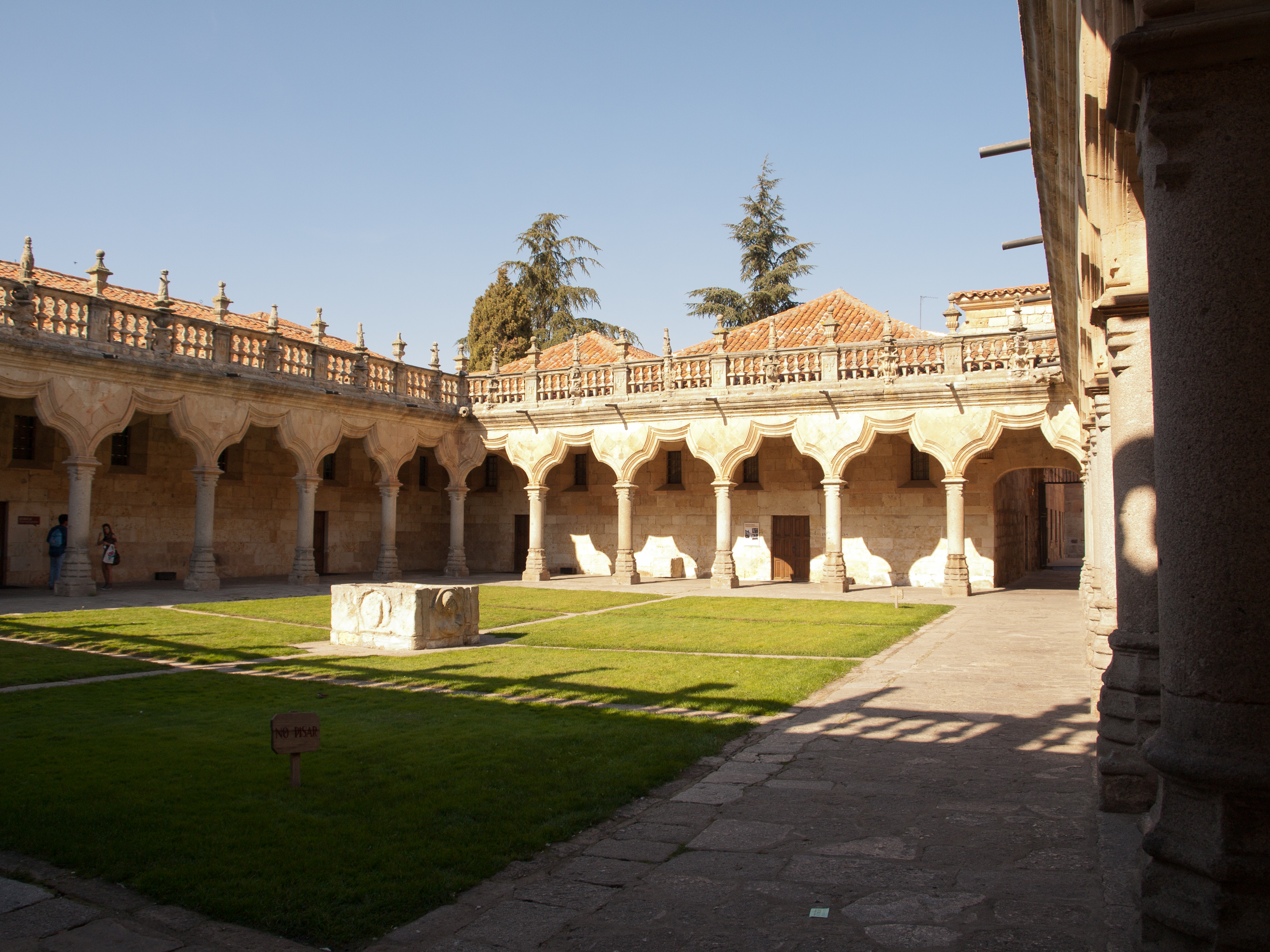 Patio de las Escuelas Menores